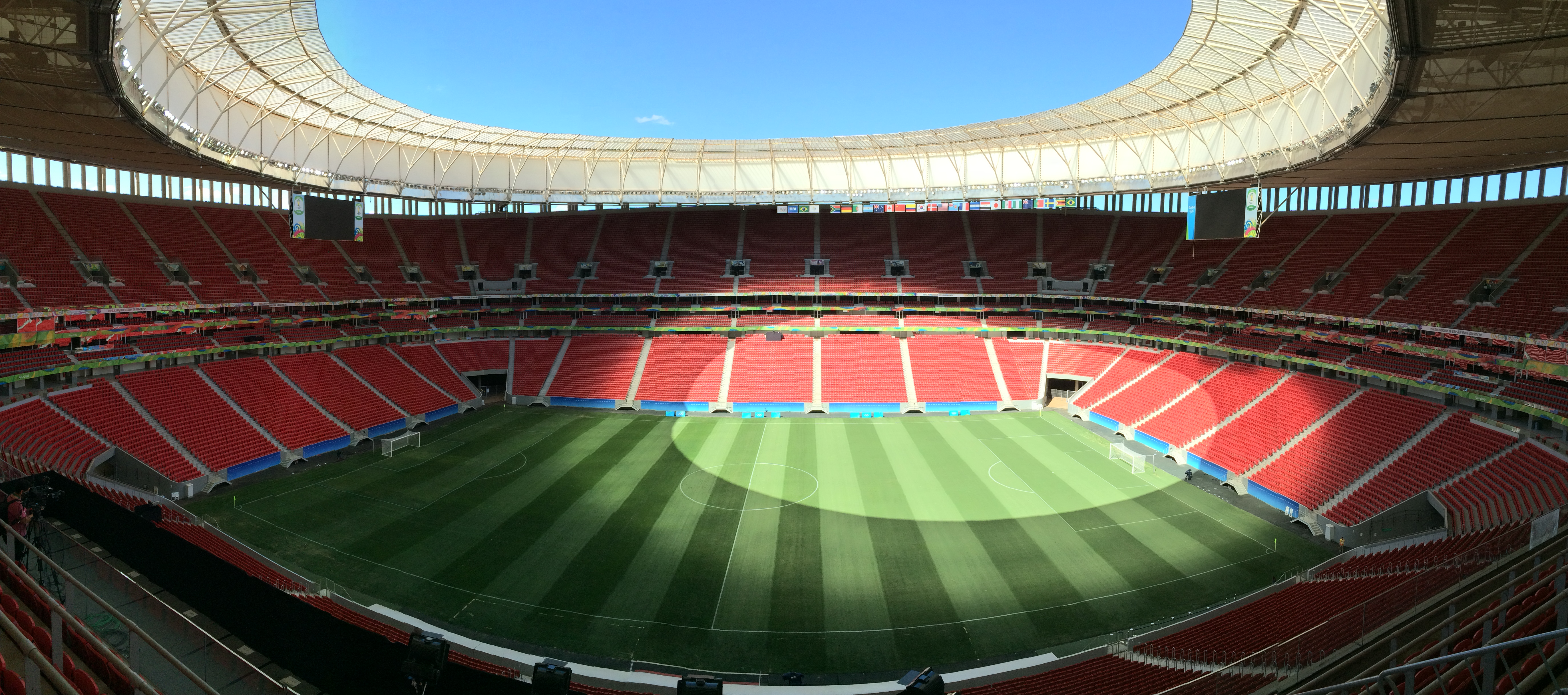 Estádio Nacional Mané Garrincha, Brasília, DF, Brasil 3/8/2016 Foto: Andre Borges/Agência Brasília. As quatro seleções que estreiam no torneio de futebol da Olimpíada 2016 no Estádio Nacional de Brasília Mané Garrincha fizeram reconhecimento do gramado na tarde desta quarta-feira (3). Os técnicos do Brasil, da África do Sul, do Iraque e da Dinamarca também falaram com a imprensa já usando as instalações da arena esportiva.